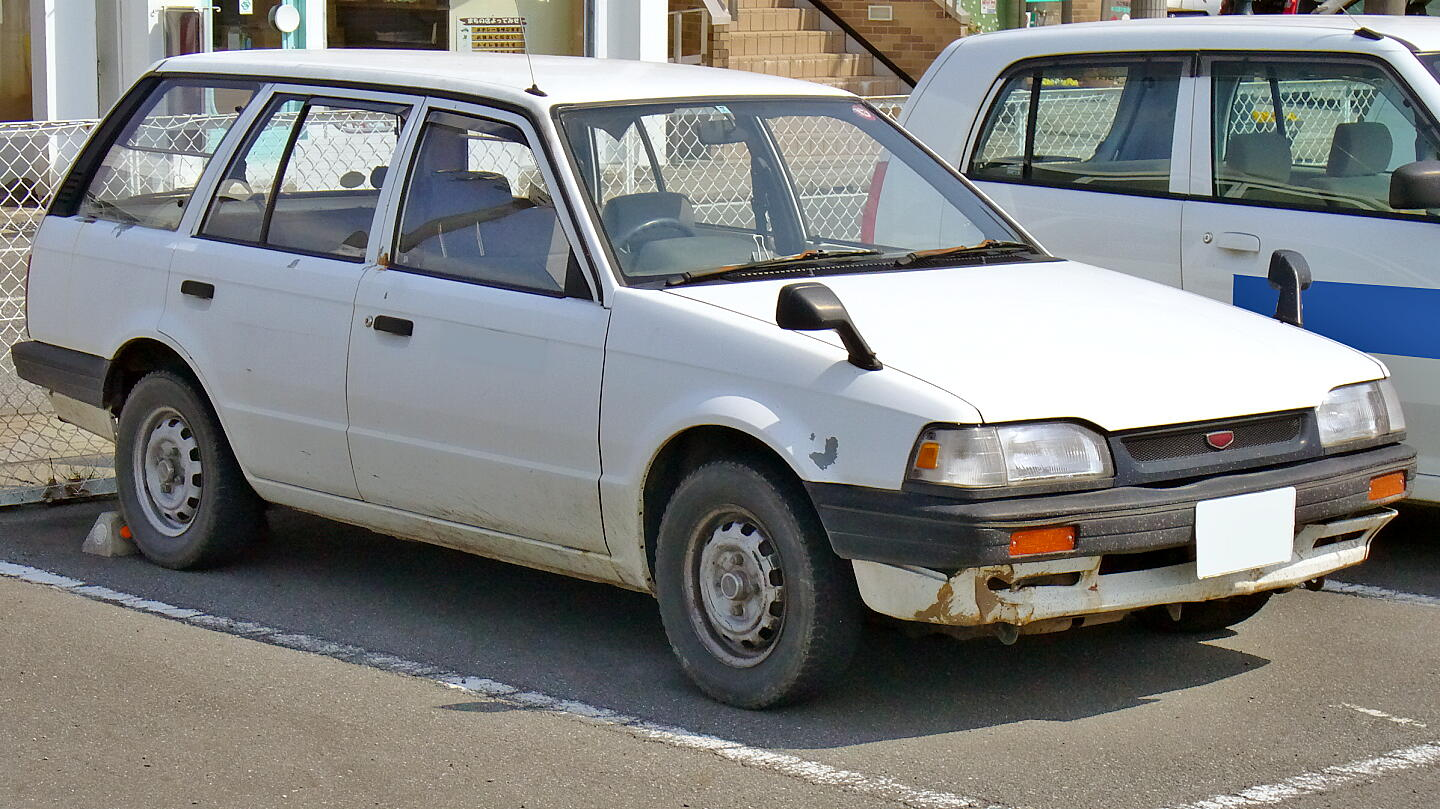 マツダ・ファミリアバン（BF系・後期型）